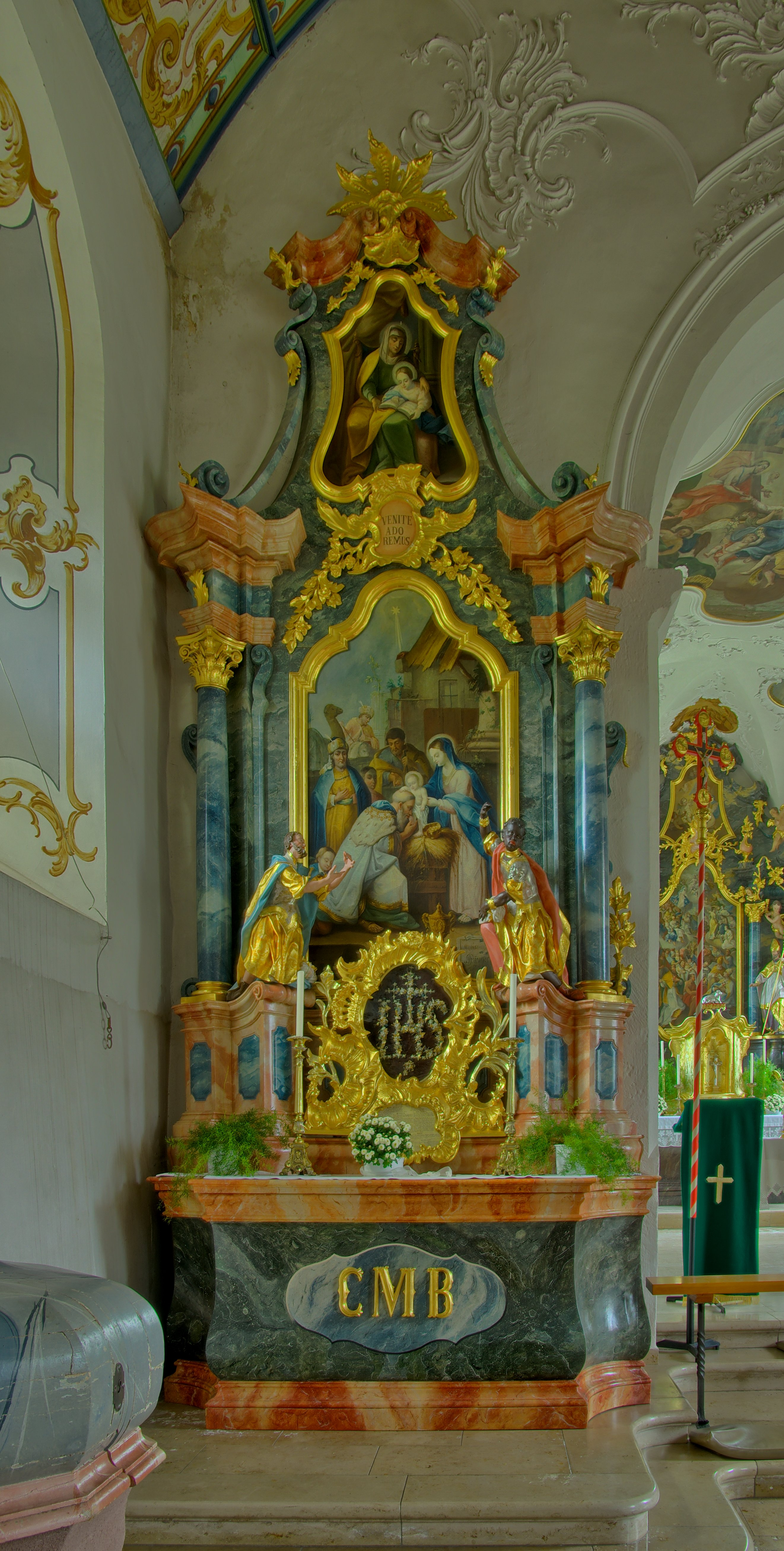 Die Pfarrkirche in Urach